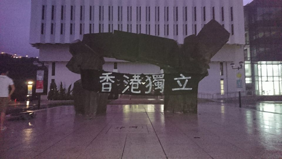 中文（香港）: 中大百萬大道的“烽火台”